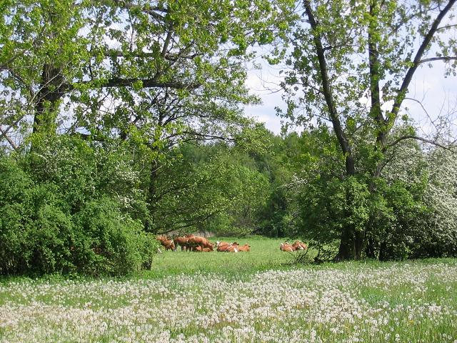 Am Freesdorfer Borchelt, Naturpark Niederlausitzer Landrücken, Brandenburg.